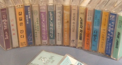 1980년대 대한민국에서 제작된 민중 가요 카세트 테이프.